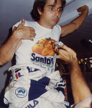 Nelson Piquet risponde ai giornalisti dopo le prove del Gran Premio d'Italia 1983 a Monza